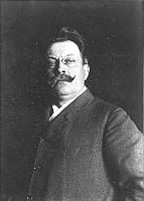 Source : ministère de la Justice, France